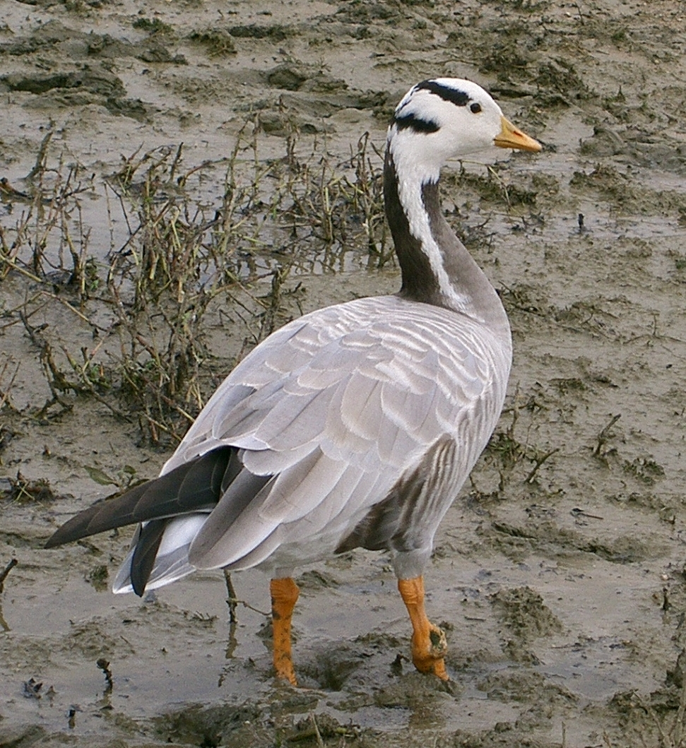 Oie à tête barrée - bar-headed goose - Anser indicus (recadrage) en migration (?) au bord d'un lac en France (Bourgogne, le 07 octobre). self made PRA